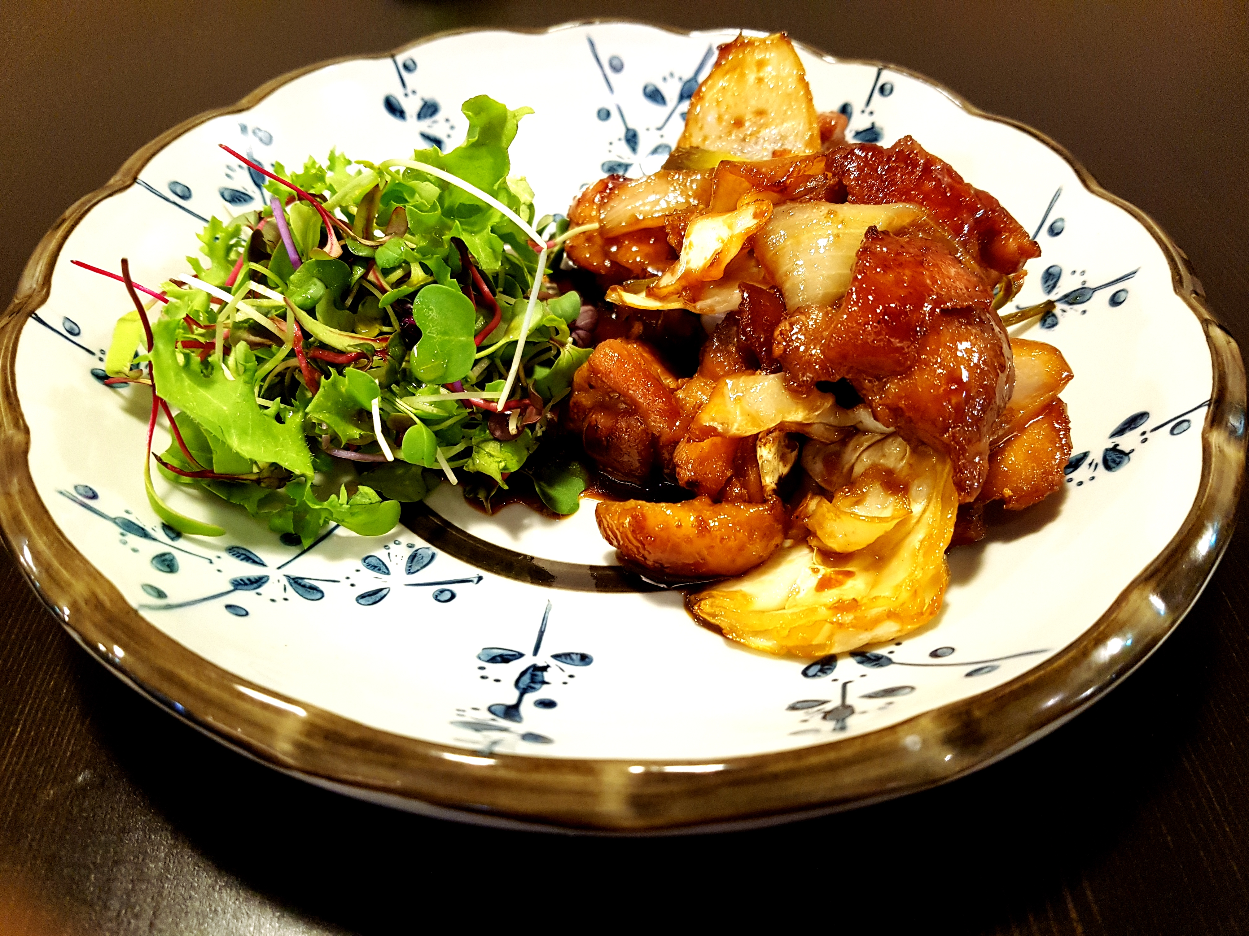 데리야키 치킨